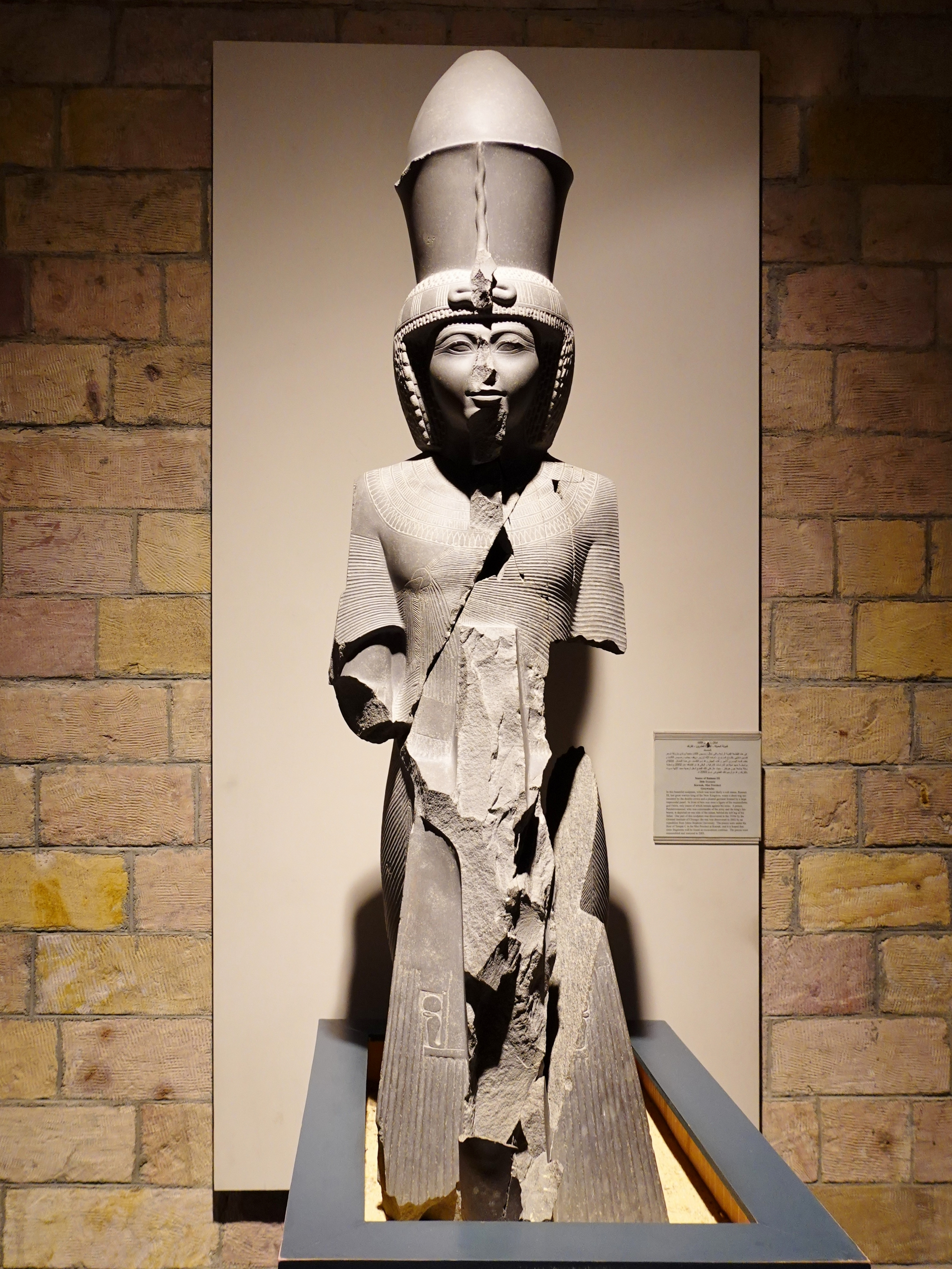 Statue des Königs Ramses III. (Grauwacke, 20. Dynastie), gefunden im Tempel C des Mut-Bezirks von Karnak, ausgestellt im Luxor-Museum, Ägypten